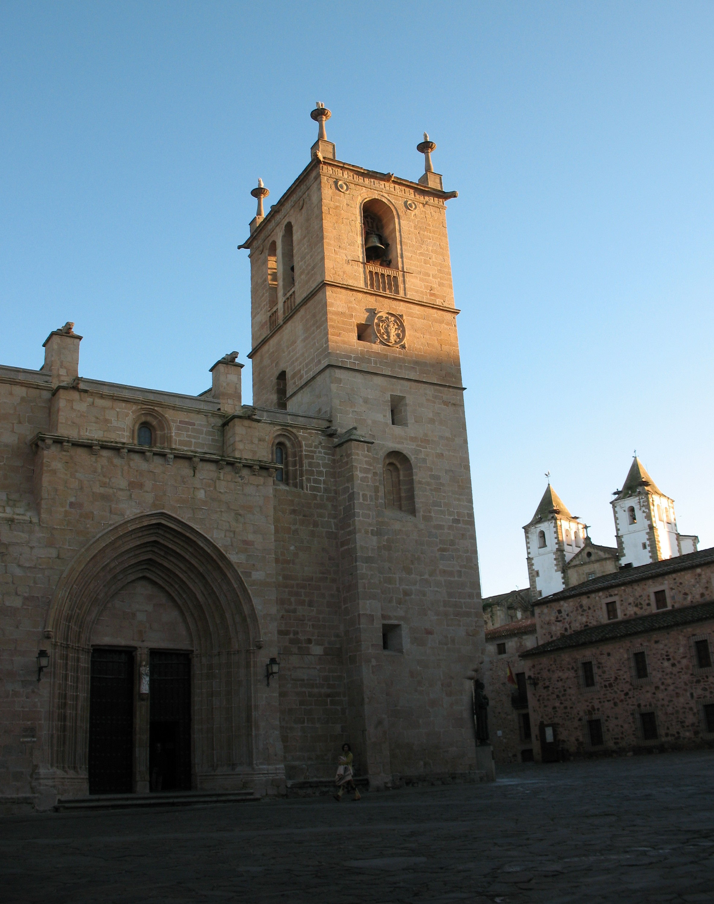 Imagen de la Iglesia de Santa María de Cáceres donde se puede apreciar la torre del campanario y parte de la portada del Evangelio, con las torres de la Iglesia de San Francisco Javier al fondo.